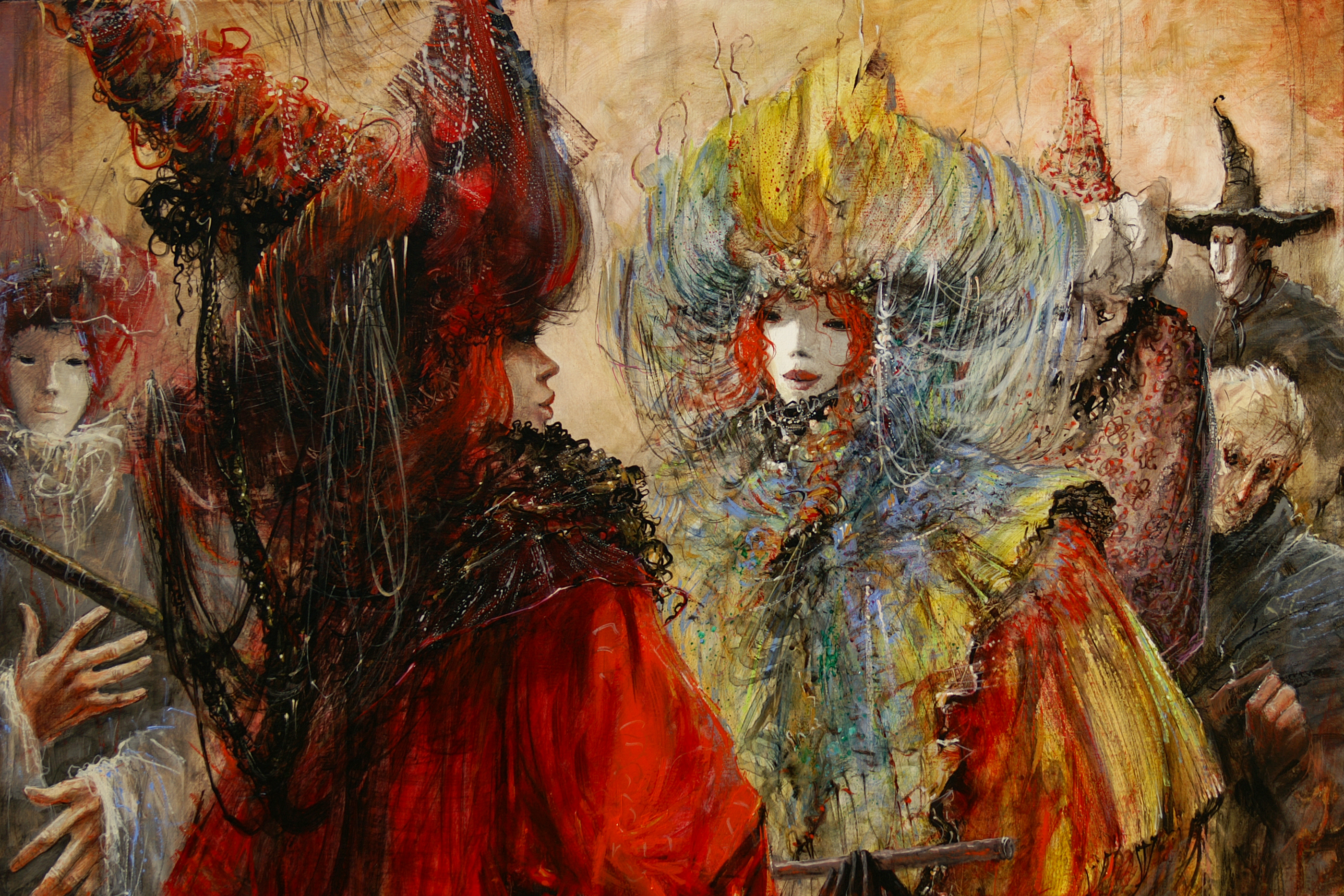 Défiance (détail) par Marcel Pajot - Technique mixte sur toile.